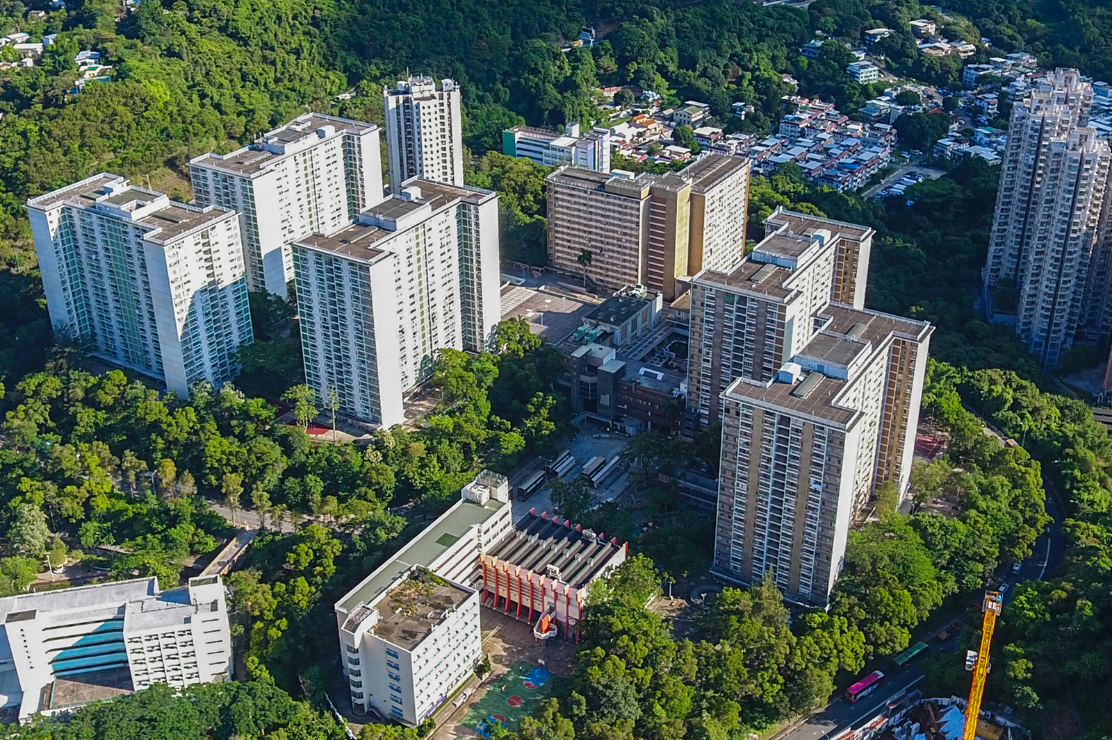 Sun Tin Wai Estate